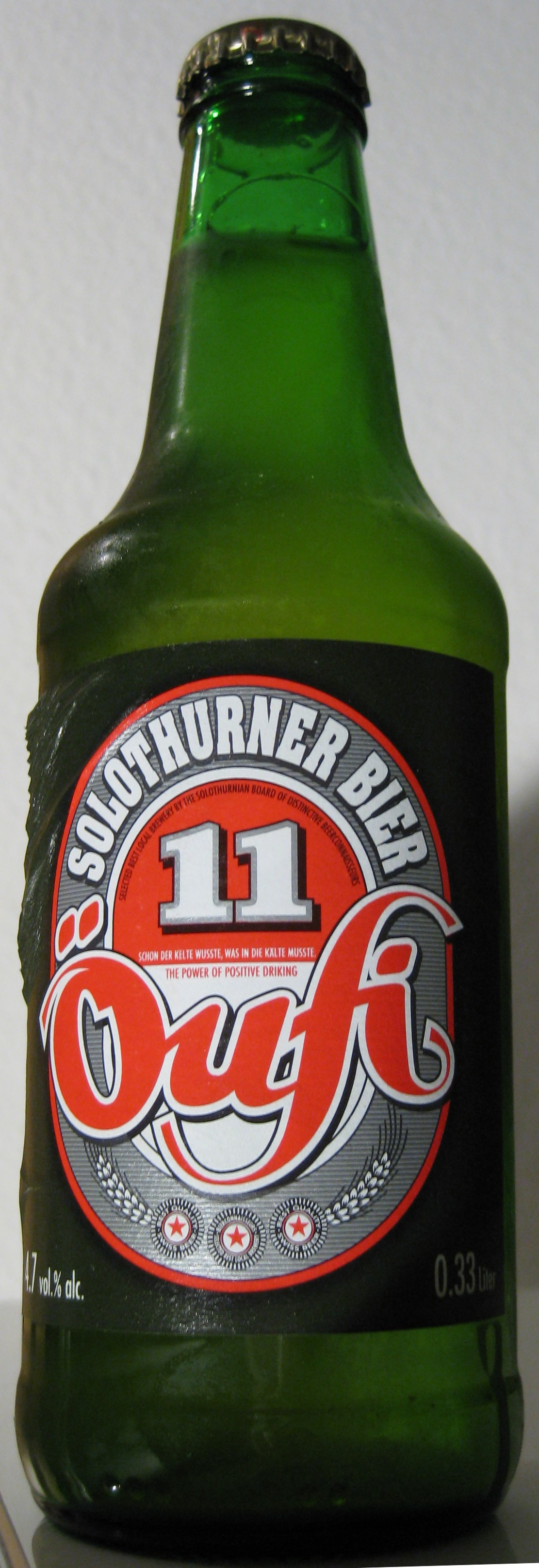 Öufi Bier im Glas. Bier aus dem Kanton Solothurn, Schweiz.